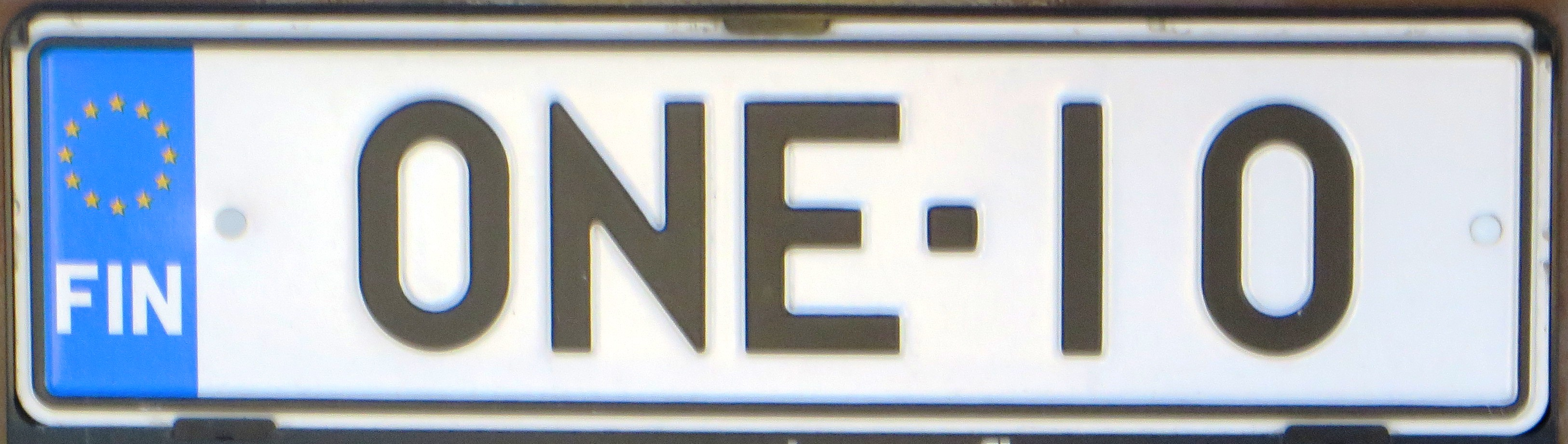 persoonlijke plaat Finland